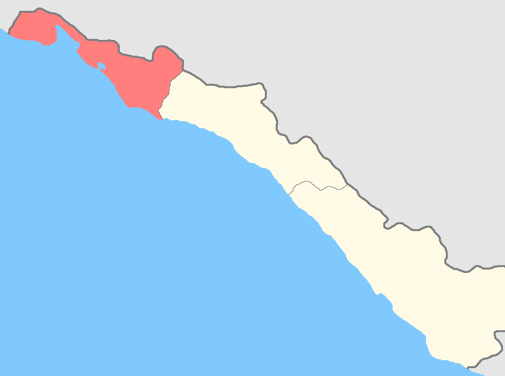 Новороссийский округ на карте Черноморской губернии